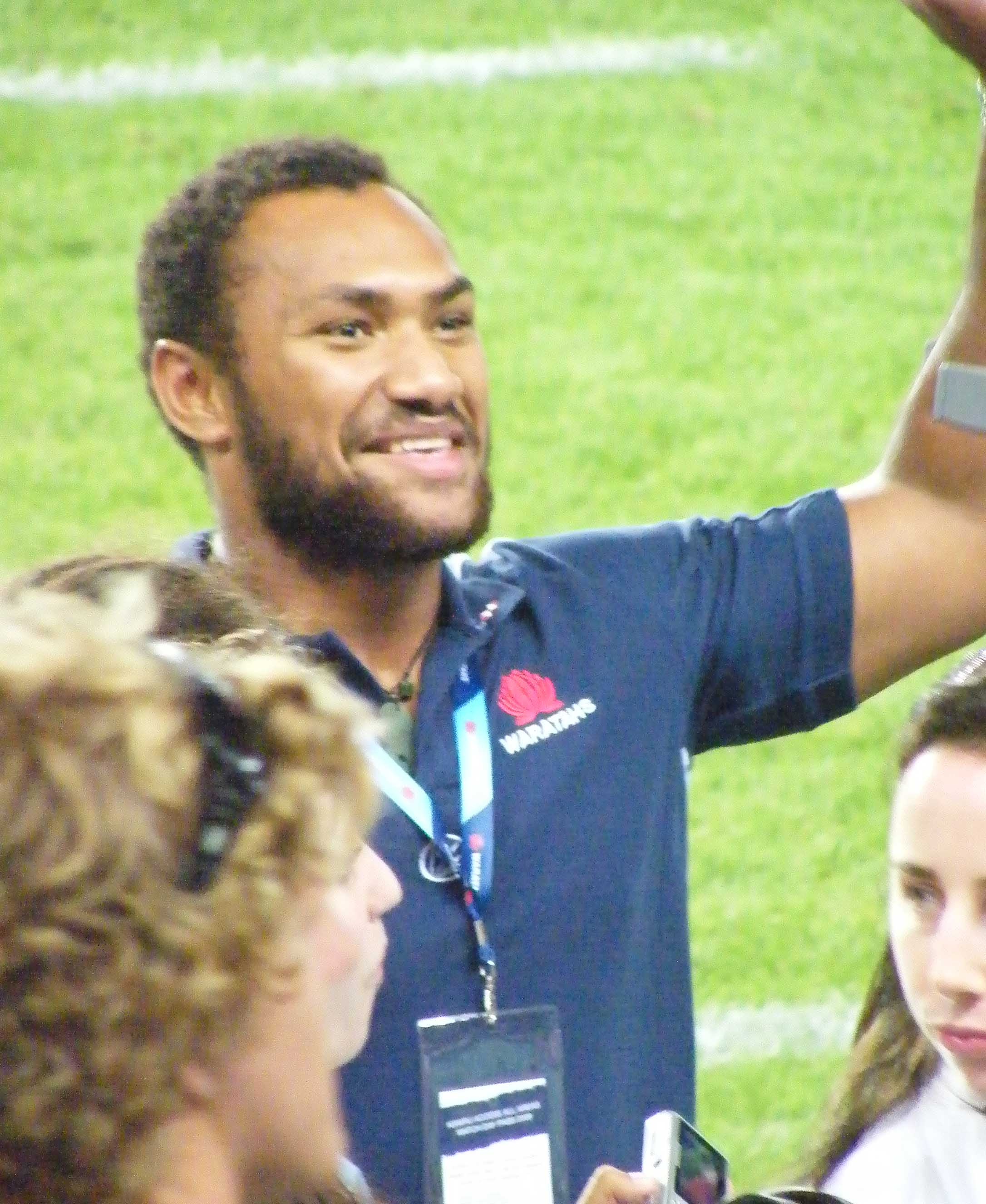 NSW Waratahs winger Ratu Nasiganiyani.